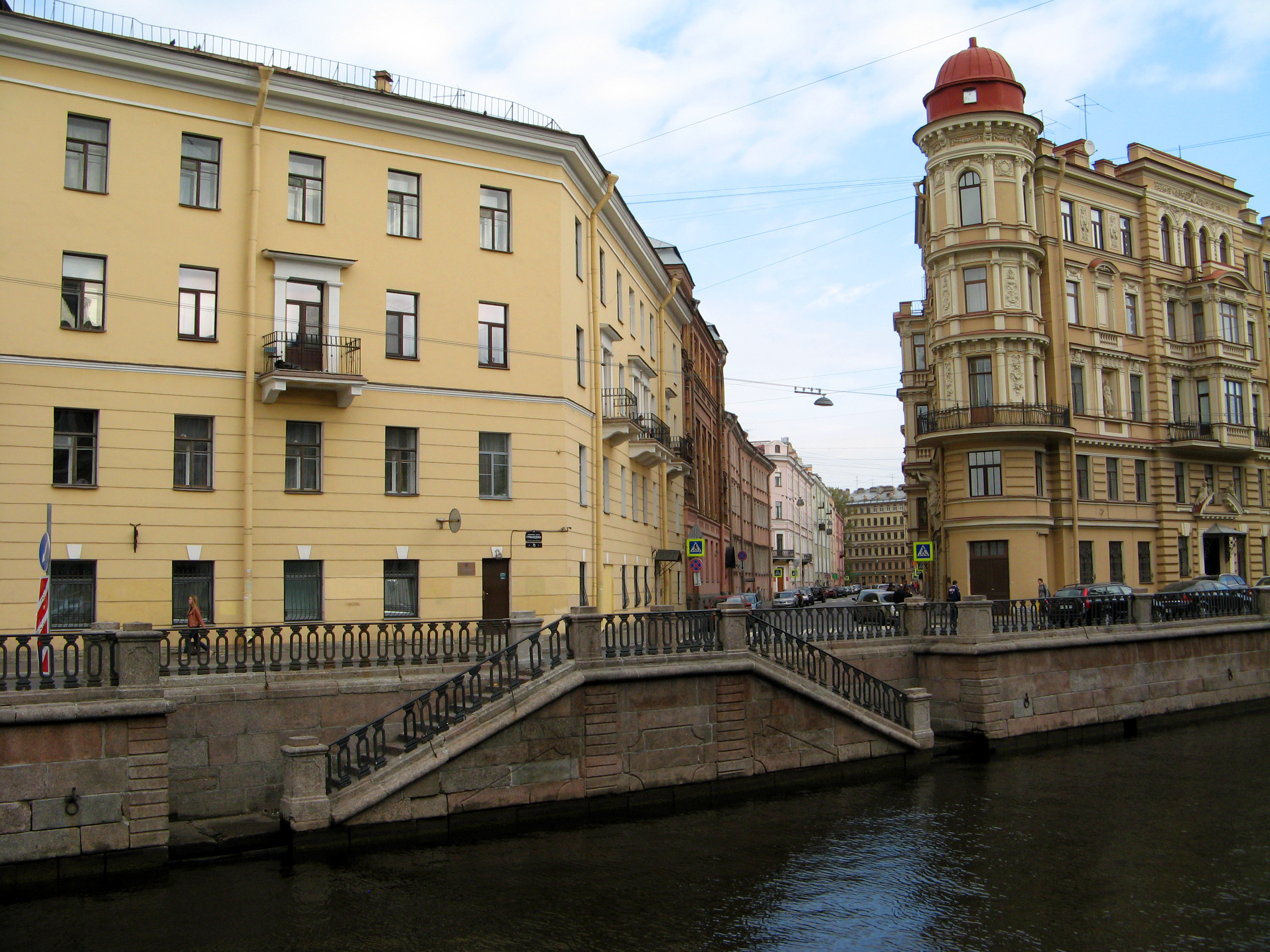 Санкт-Петербург. Набережная Екатерининского канала (канала Грибоедова). Спуск к каналу у Казначейской улицы